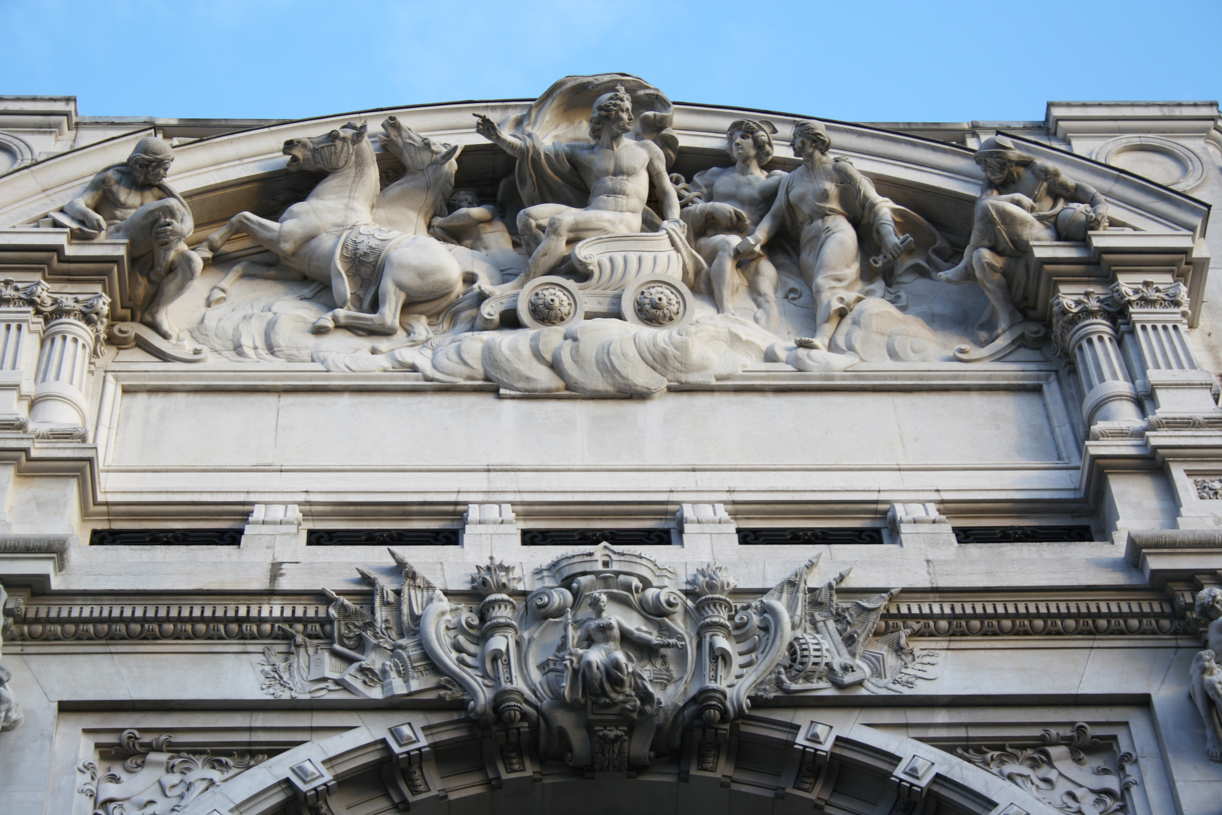 Ehemaliger Eingang zum Kaufhaus Grands Magasins Dufayel, 26, rue de Clignancourt im 18. Arrondissement von Paris, Relief von Jules Dalou Le Progrès entraînant le commerce et l'industrie